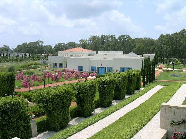 Bahjí Pilgrim Centre